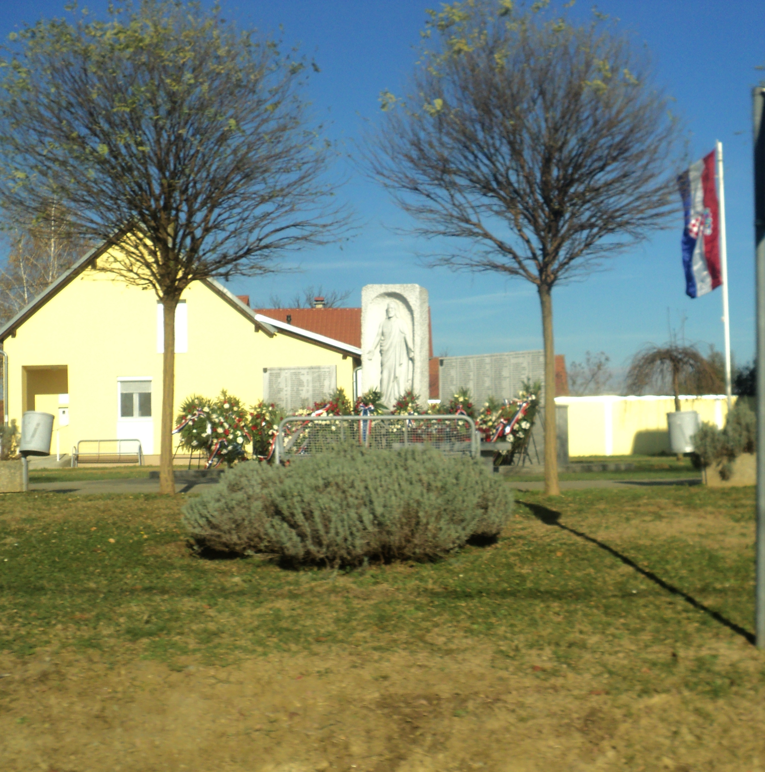 Spomen obilježje žrtvama Domovinskog rata u Bogdanovcima